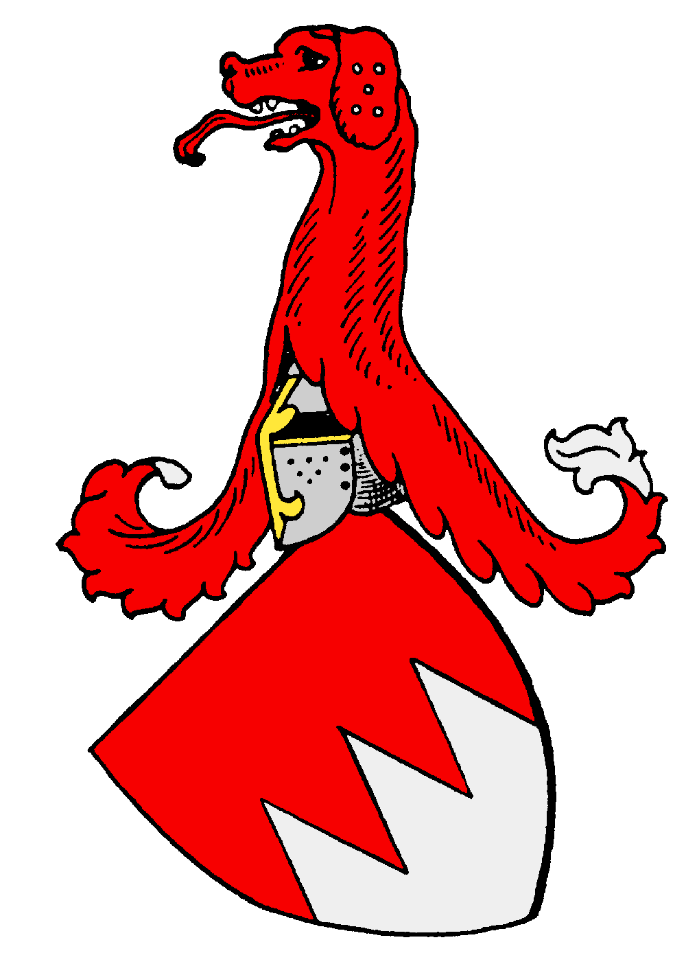 Wappen der von Heusenstamm